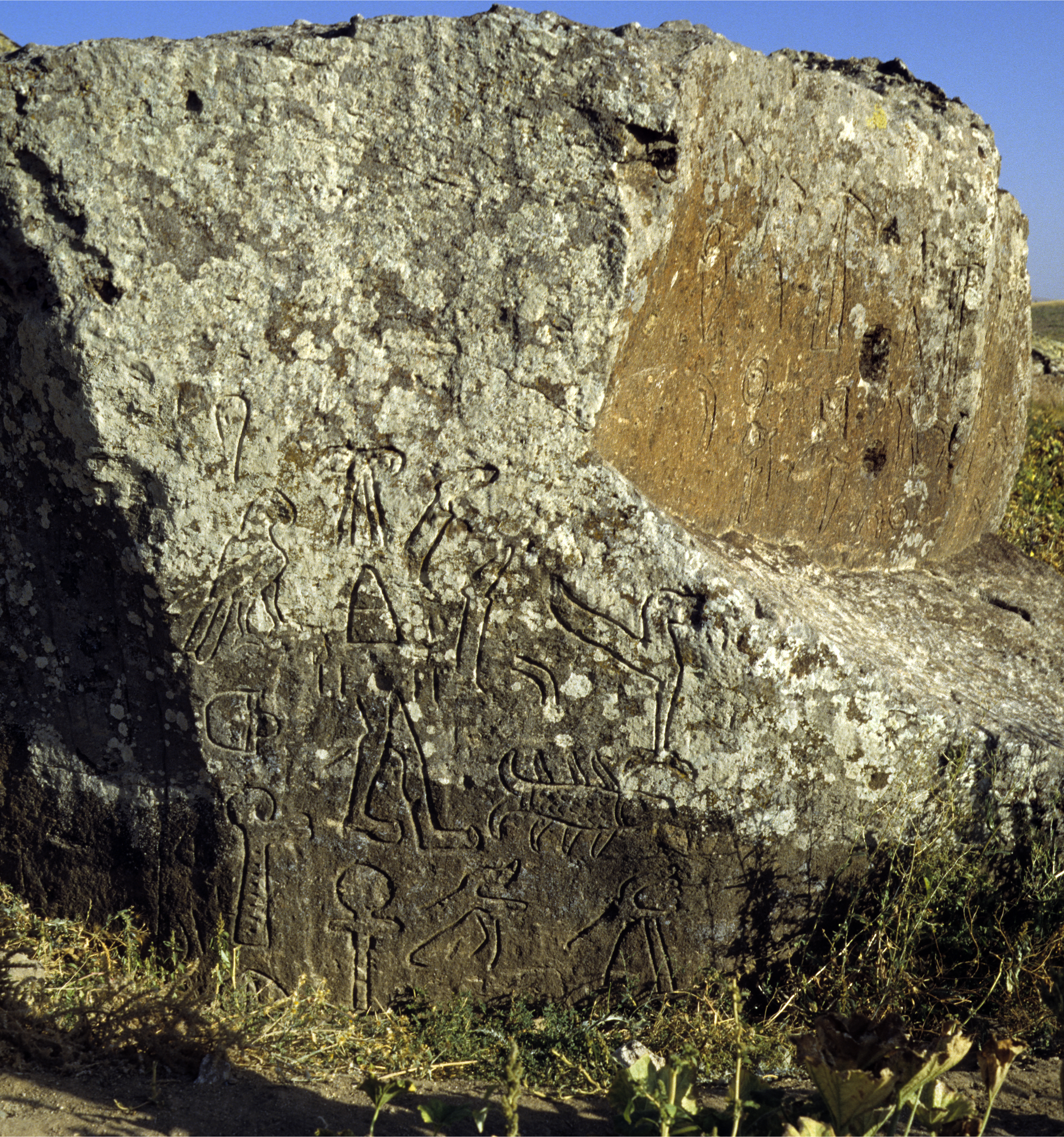 Suvasa, Hieroglyphen-luwischer Inschriftenstein bei Gökçetoprak, Gülşehir, in Kappadokien, Zentraltürkei